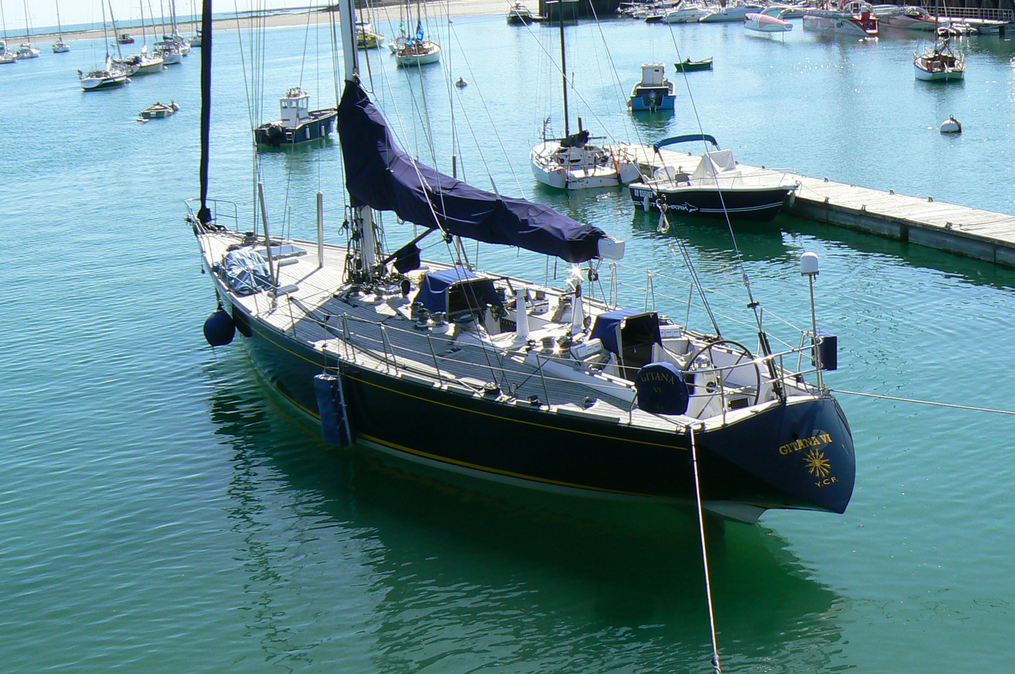 monocoque